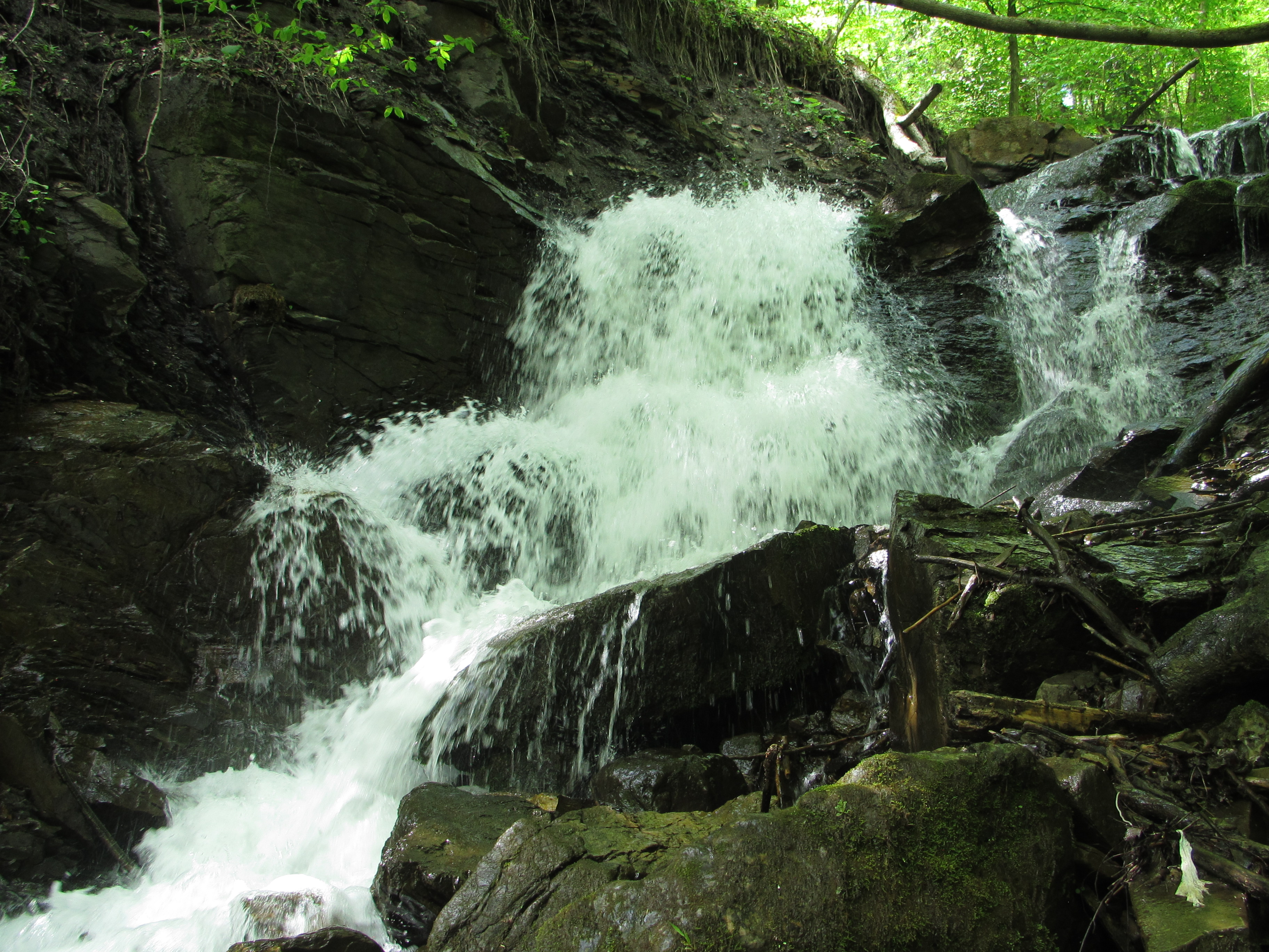 Водоспад Малотростянецький